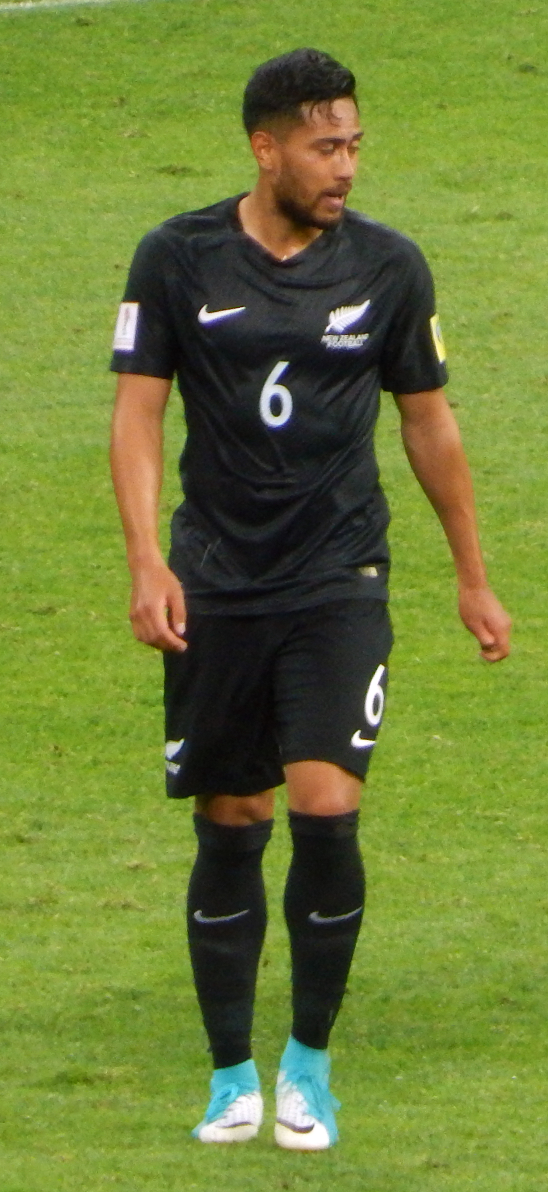 Билл Туилома в матче против сборной Мексики